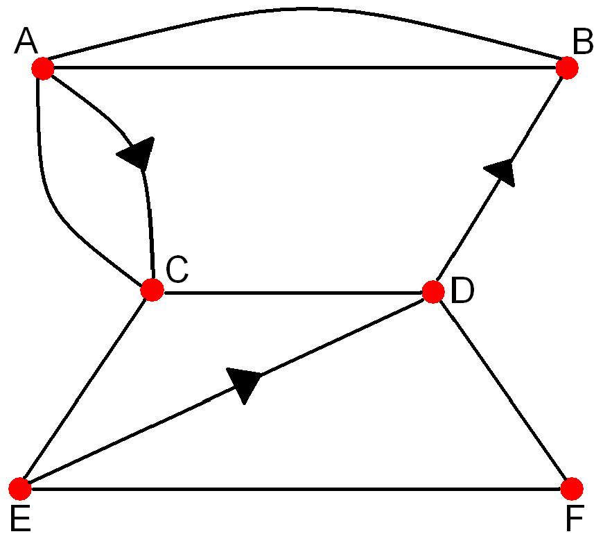 Schematische weergave van wegenstructuur.